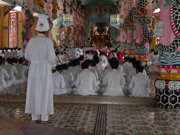 Cao Dai Ceremony